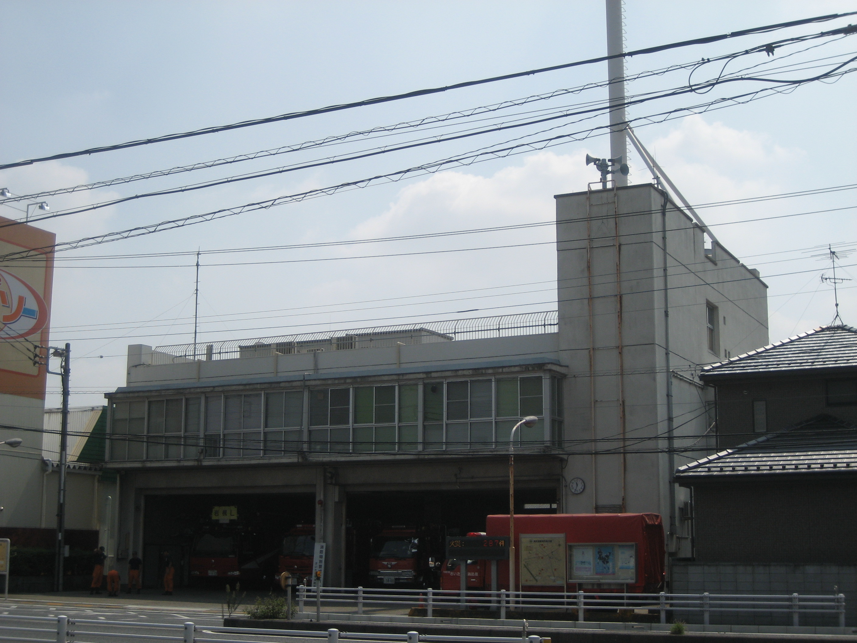 さいたま市消防局岩槻消防署